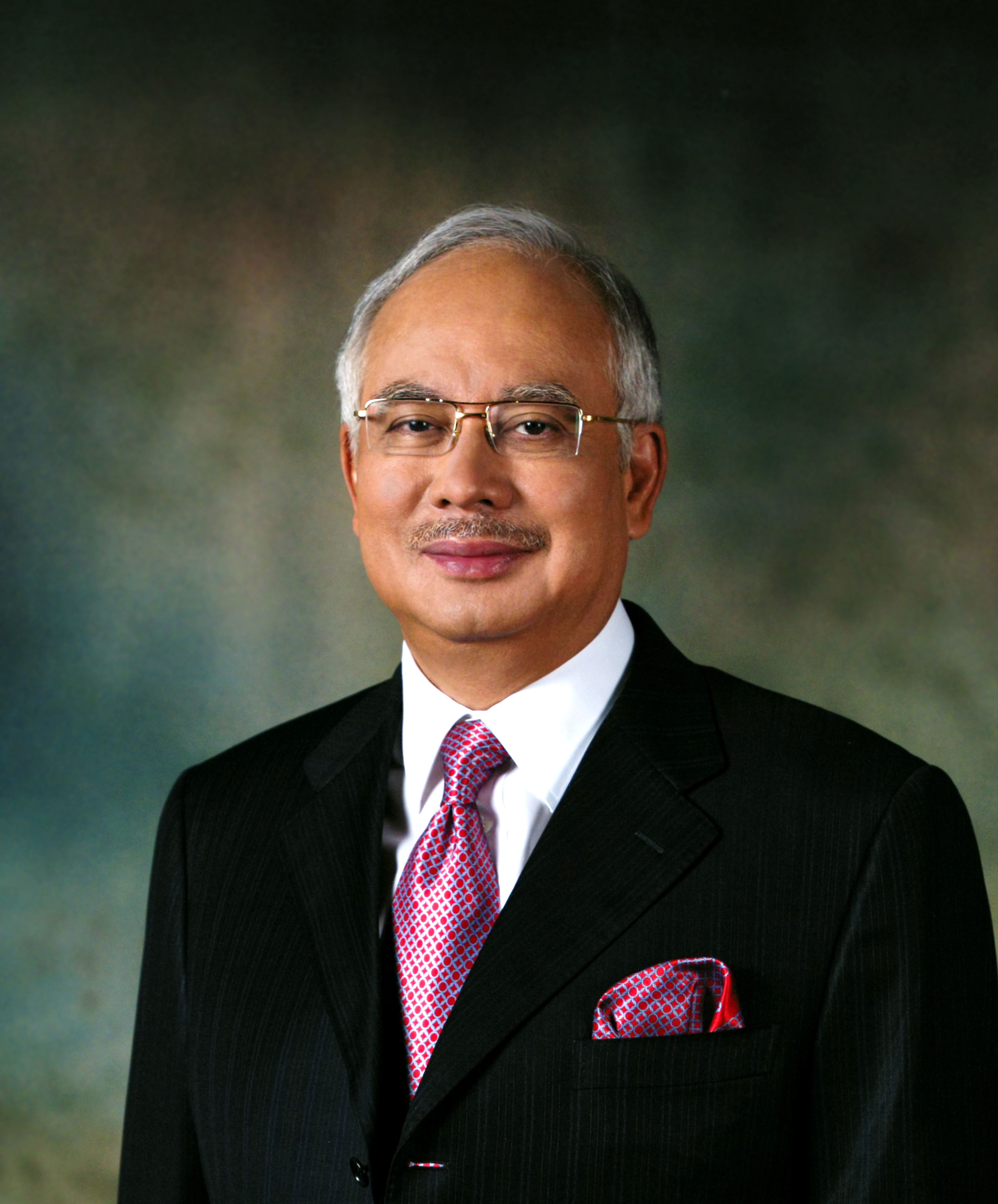 Malaysian Prime Minister, Najib Tun Razak